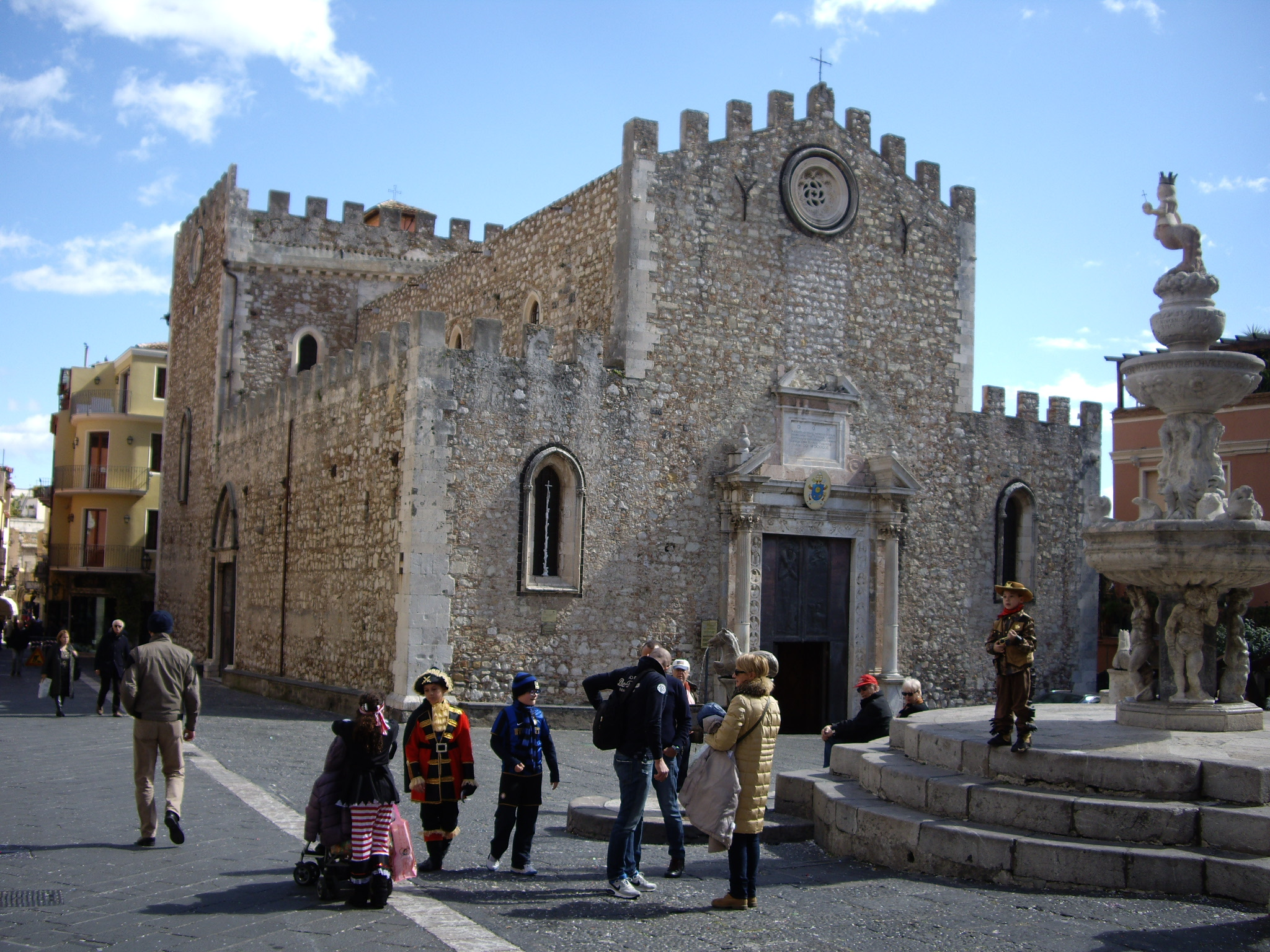 Taorminako katedrala